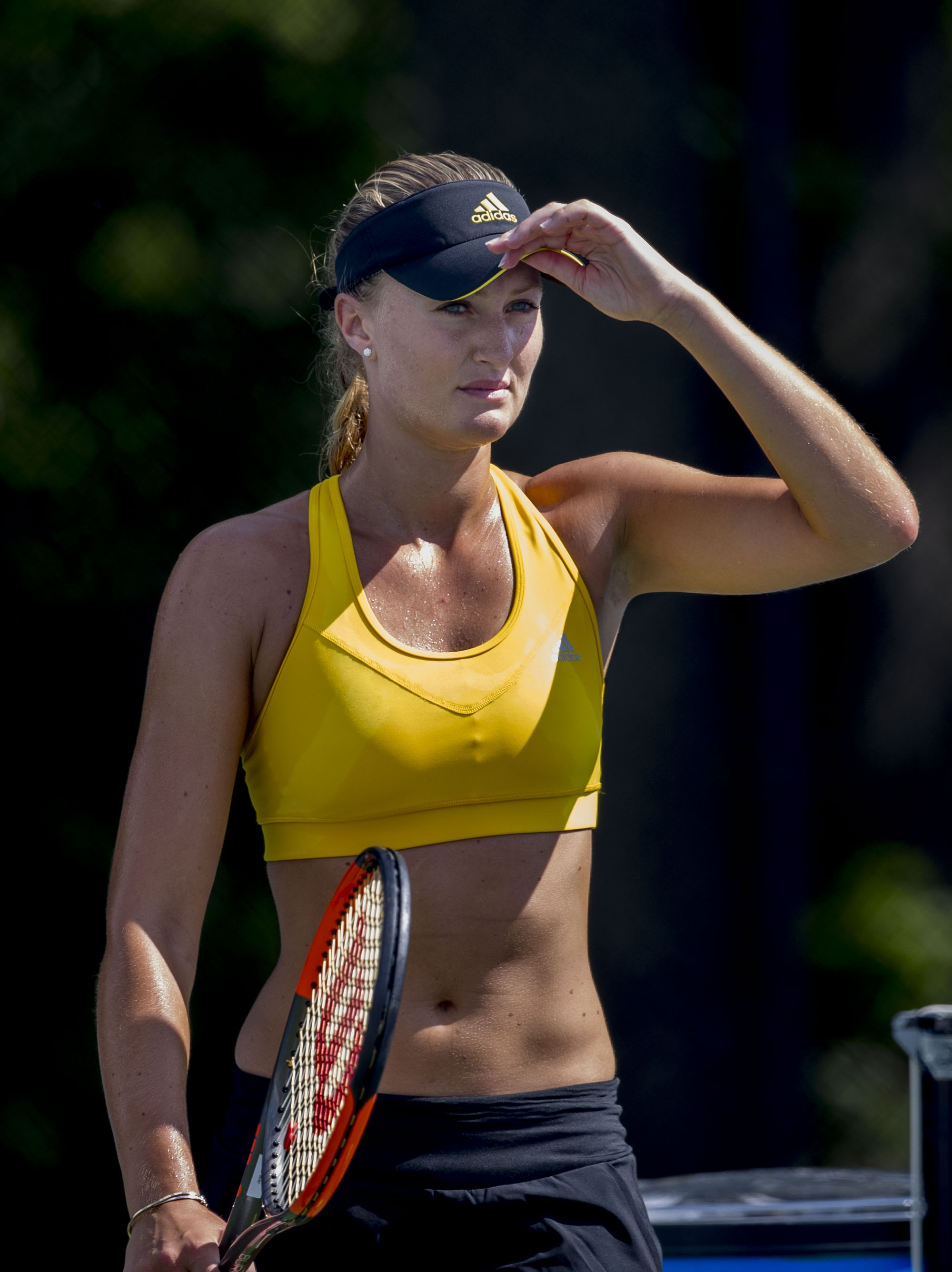 Citi Open Tennis 2017